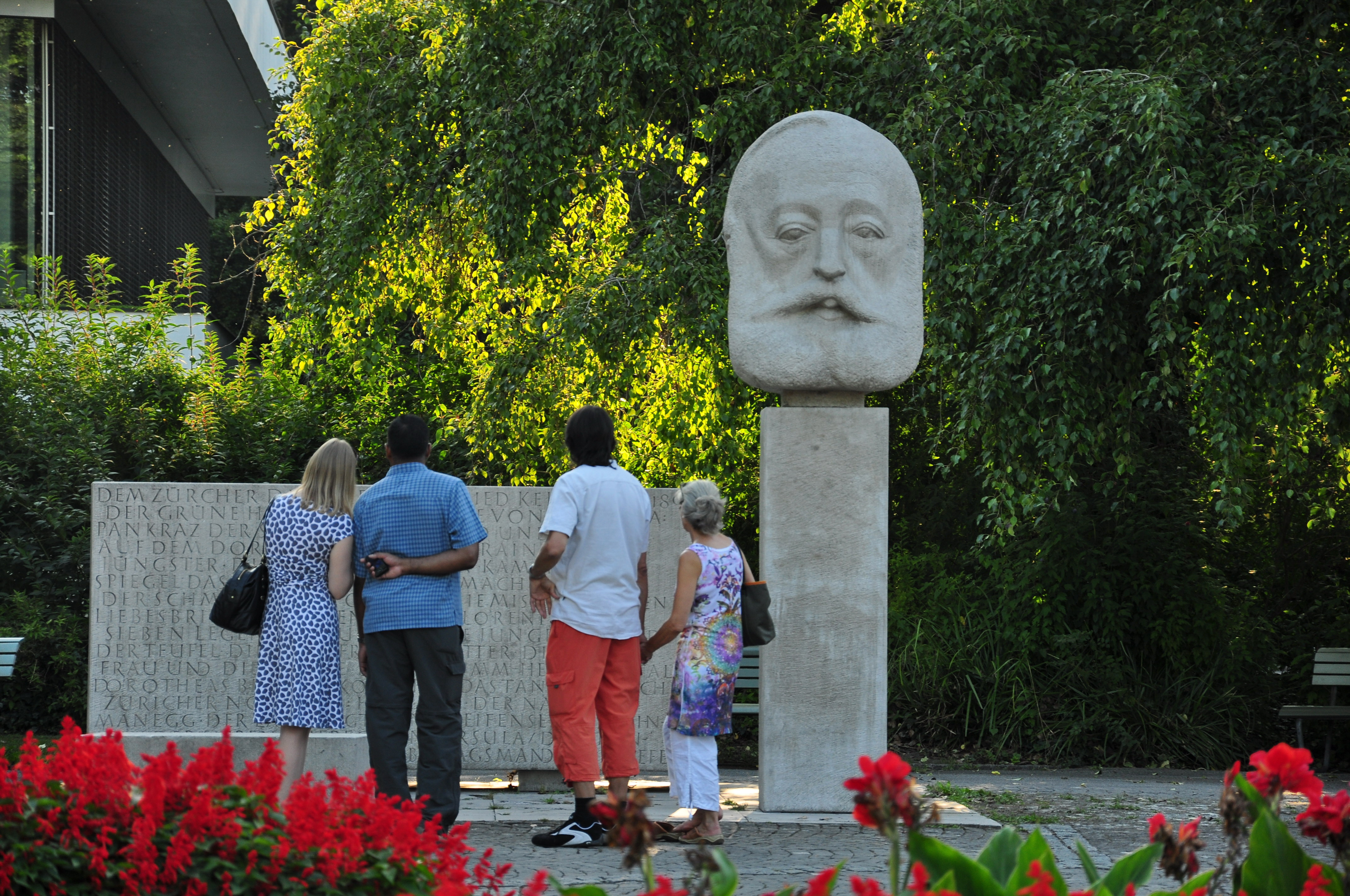 Gottfried Keller Gedenkstätte in Zürich-Enge (Switzerland)1963 vom Bildhauer Otto Charles Bänninger geschaffen.